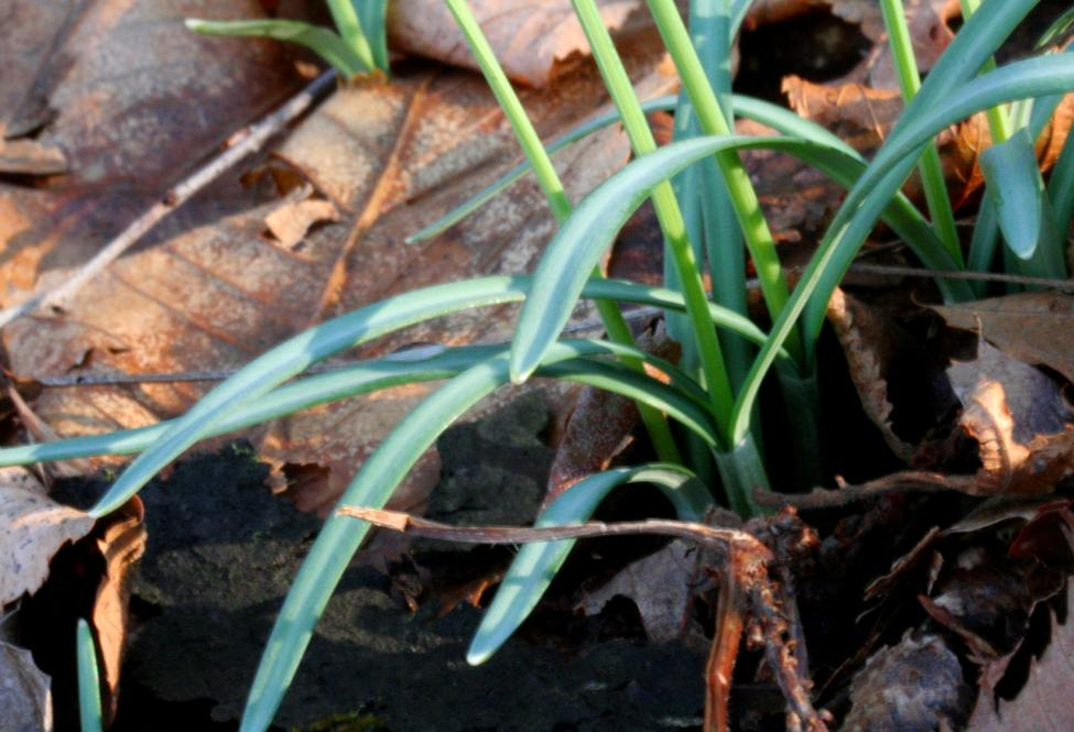 Galanthus nivalis